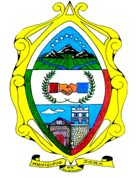 Escudo del Municipio de Sora